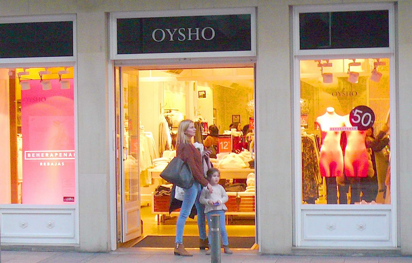 Tienda de Oysho en la Calle General Álava de Vitoria